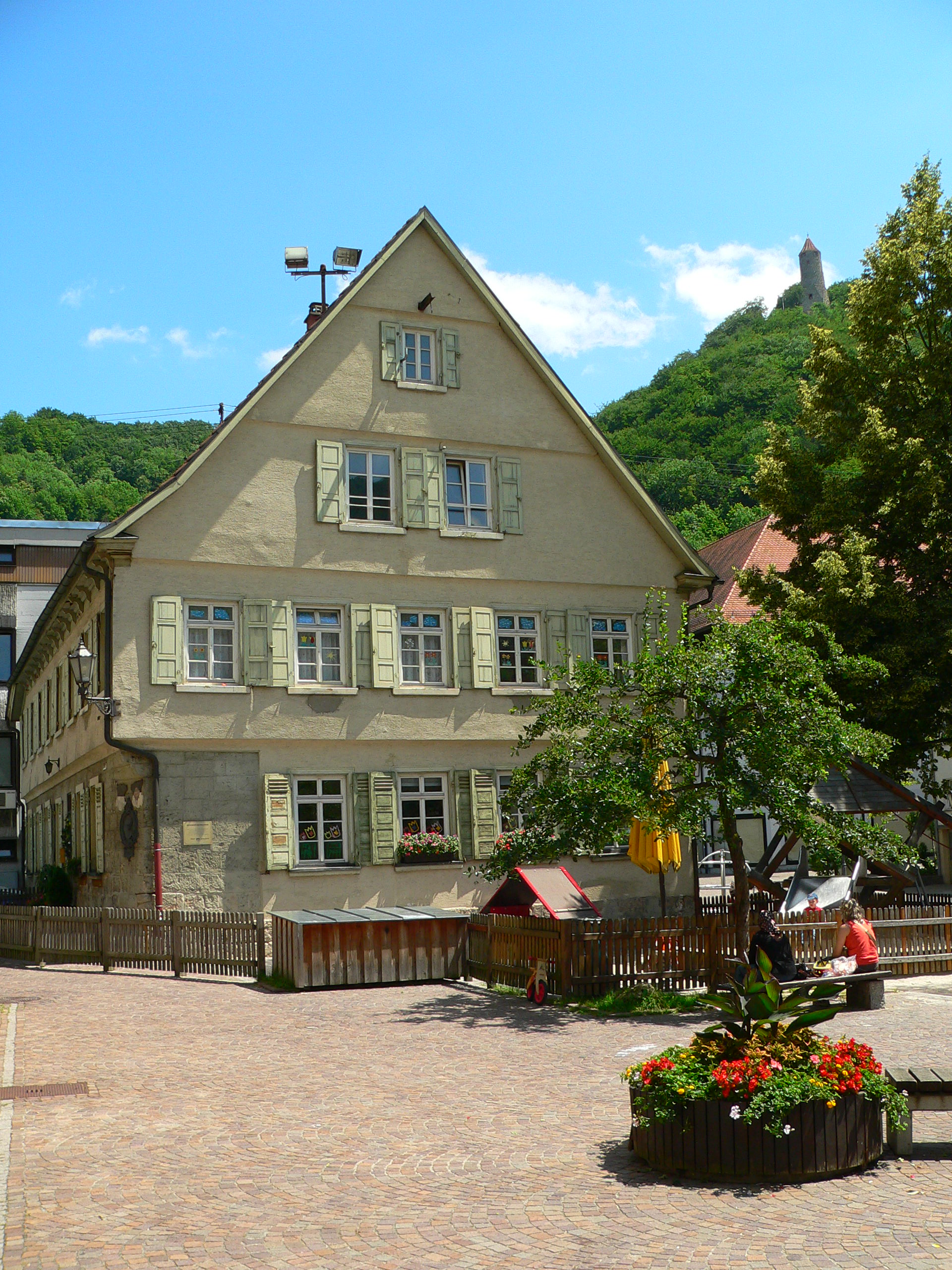 Das Schubart-Schulhaus, in dem Christian Friedrich Daniel Schubart von 1763 bis 1769 unterrichtet hat, in Geislingen an der Steige, Deutschland